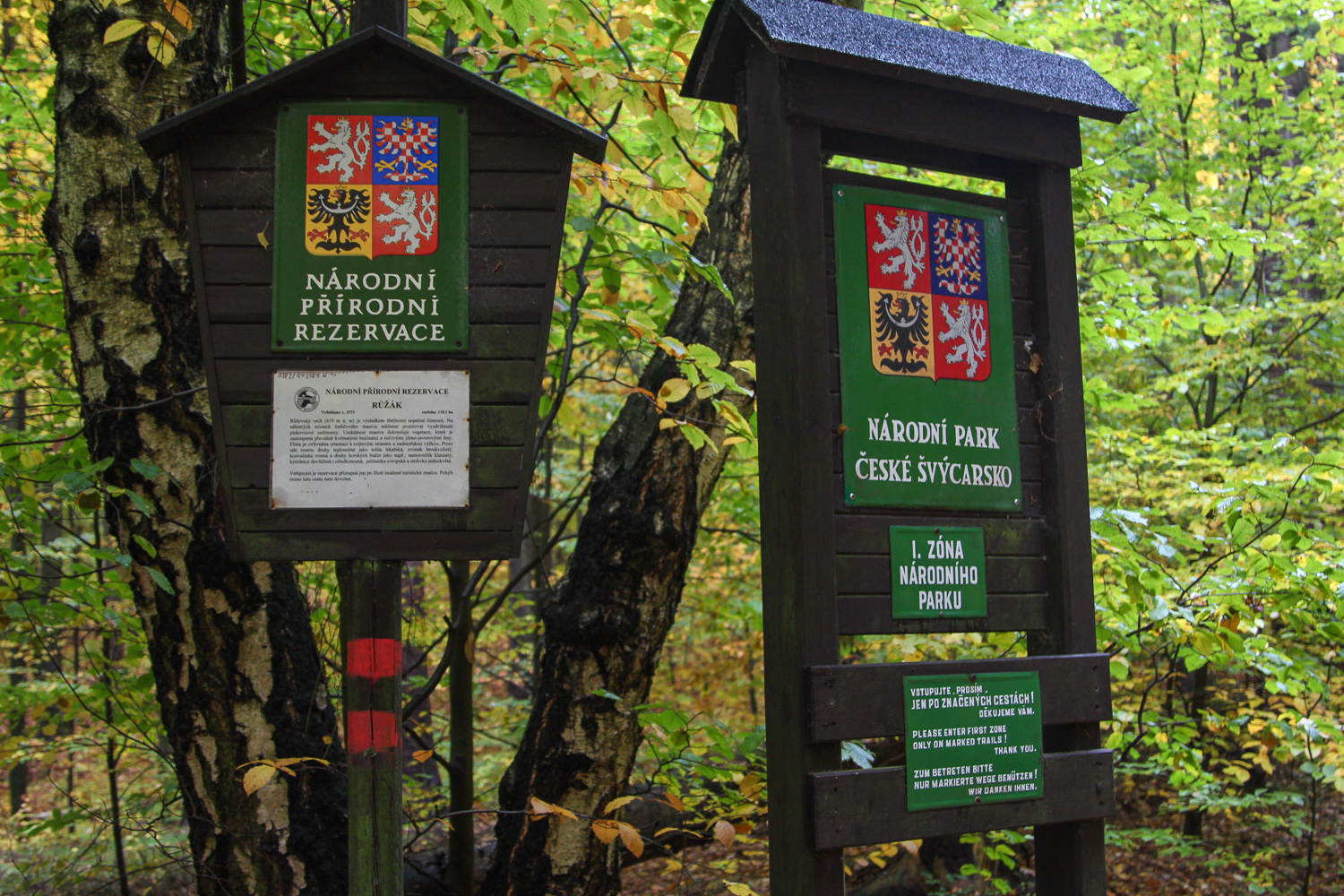 Hraniční cedule NPR Růžák a I. zóny NP České Švýcarsko.